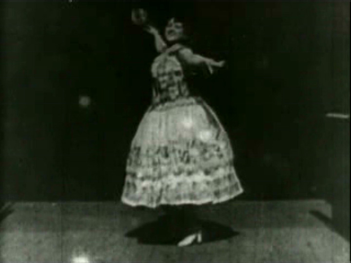 Photographie du film Carmencita avec l'actrice du même nom